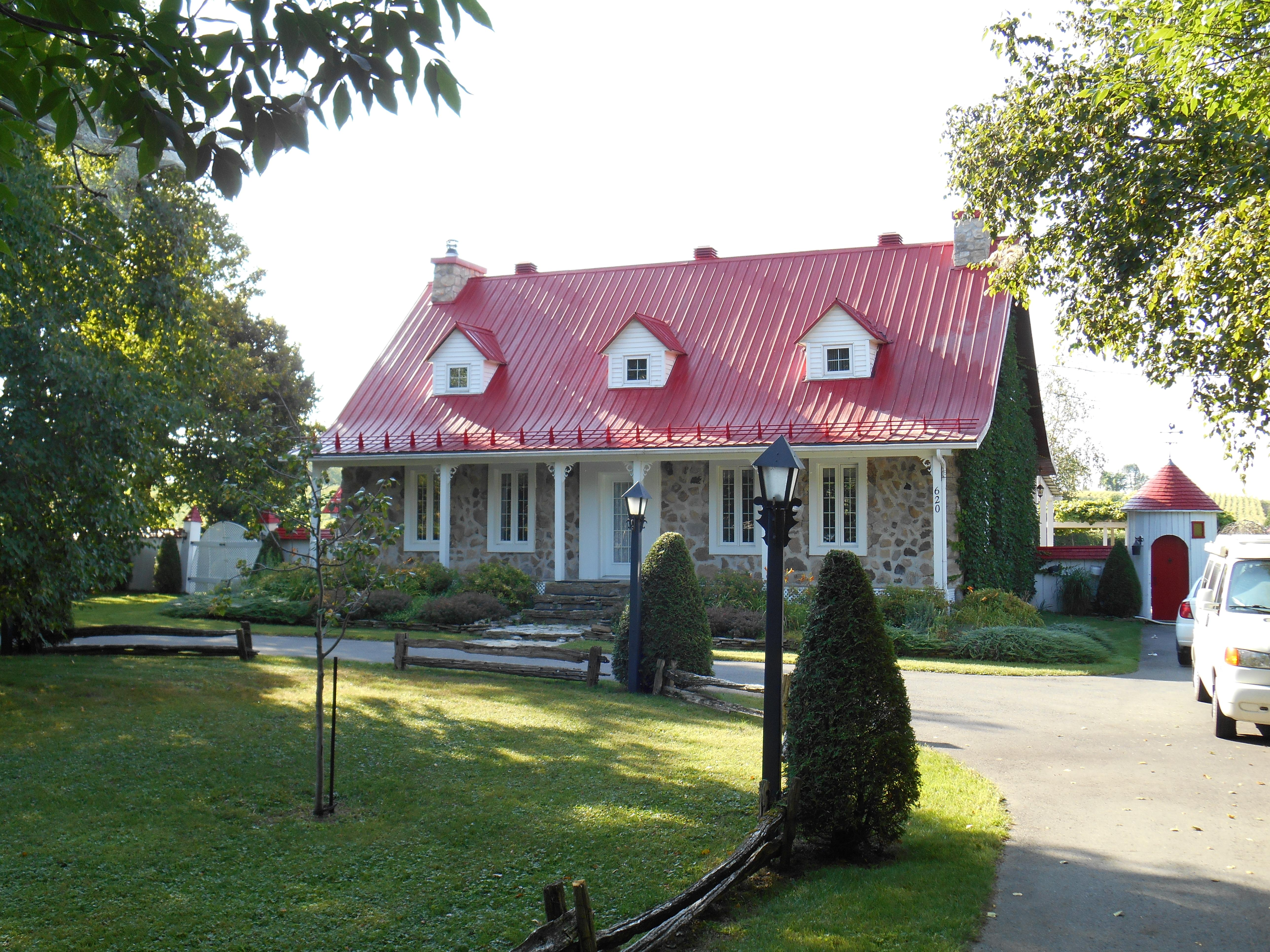 Maison, 620, boulevard des Mille-Îles, Laval